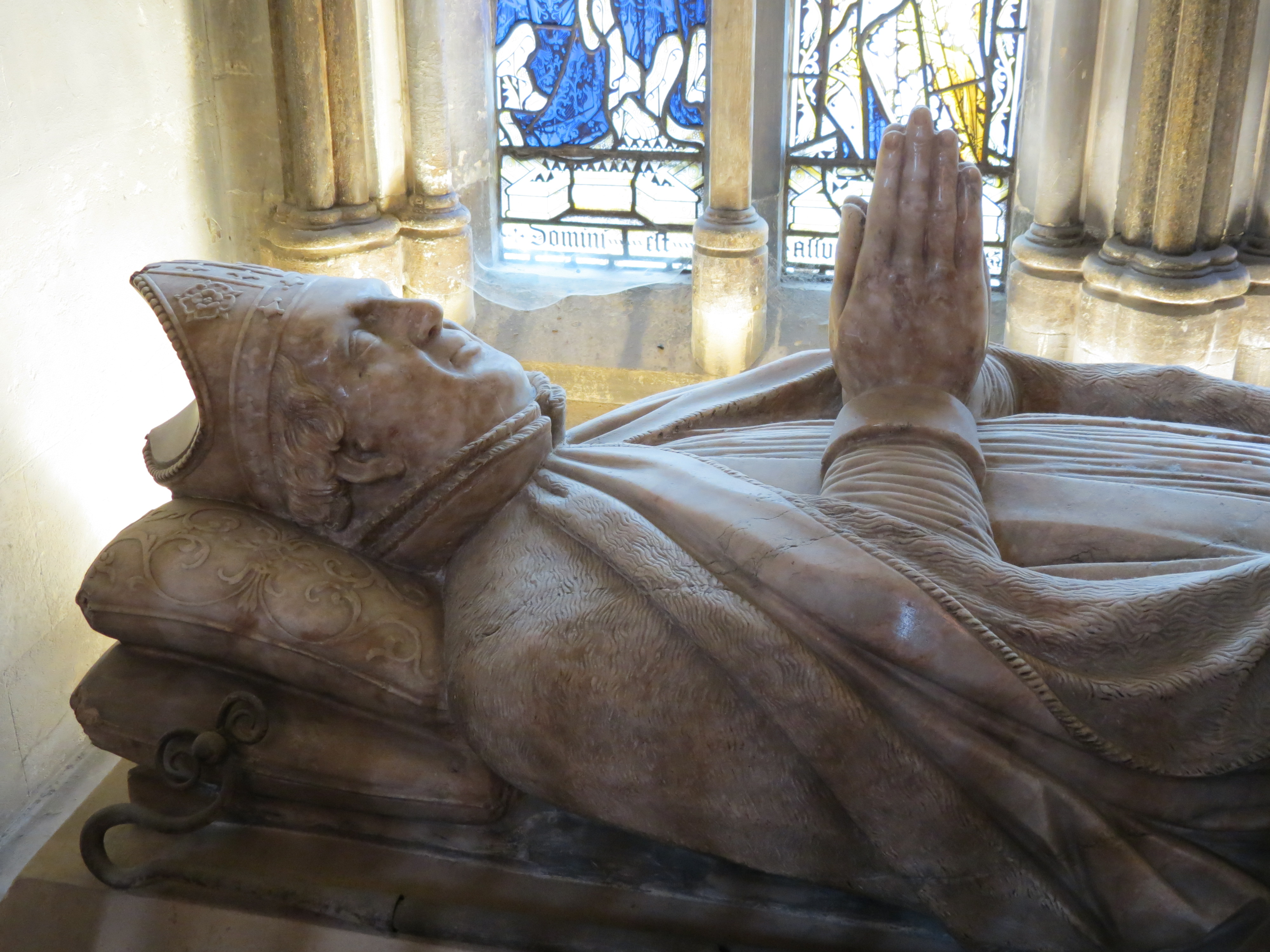 Gisant de Walter de Merton, chancelier d'Angleterre (1272-1274) puis évêque de Rochester (1274-1278) dans la cathédrale de Rochester.